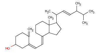 Structure de la vitamine D2